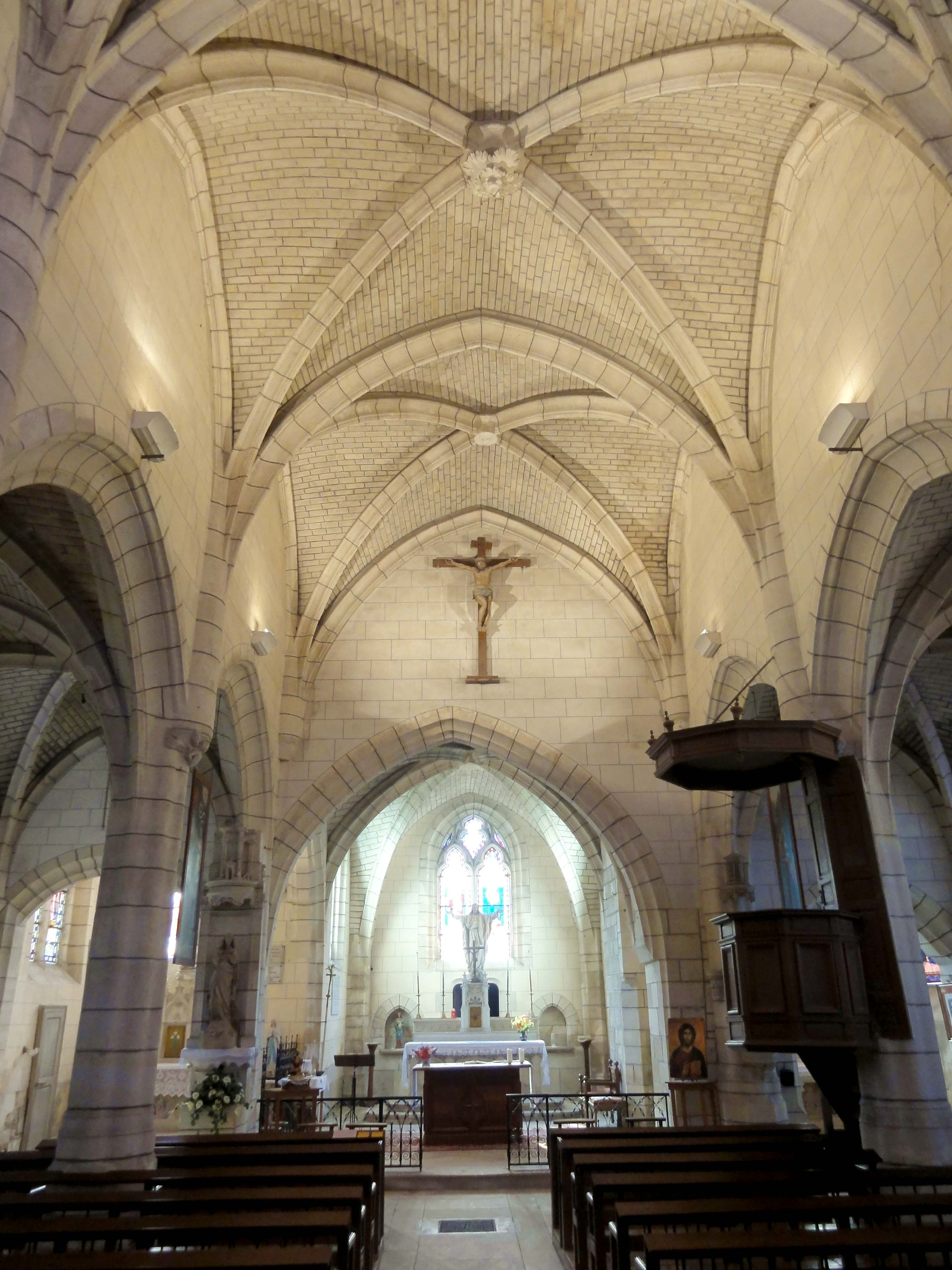 Intérieur de l'église (voir titre).